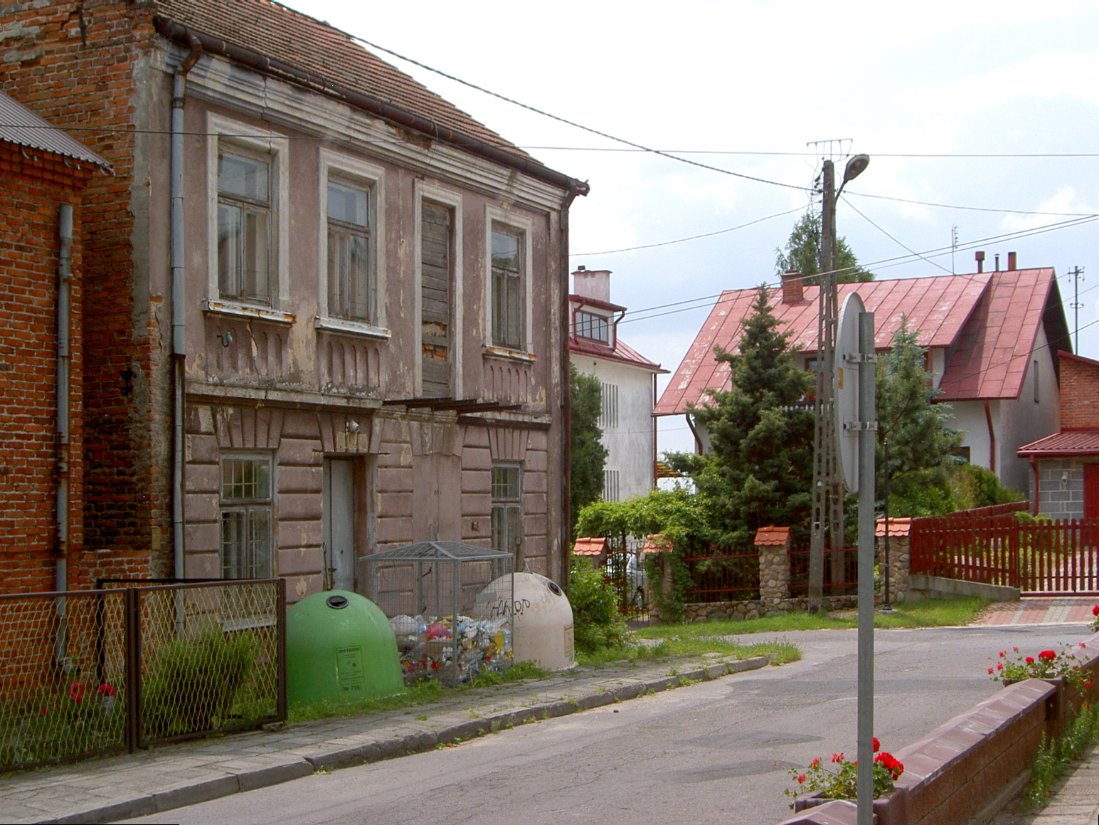 Budynek przy ulicy Stolarskiej 1. Od 2008 wyremontowany - obecnie mieści się w nim przychodnia.